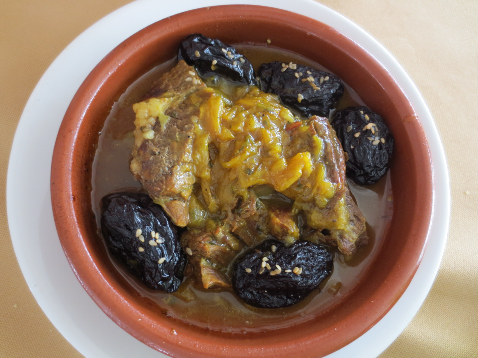 Tajine